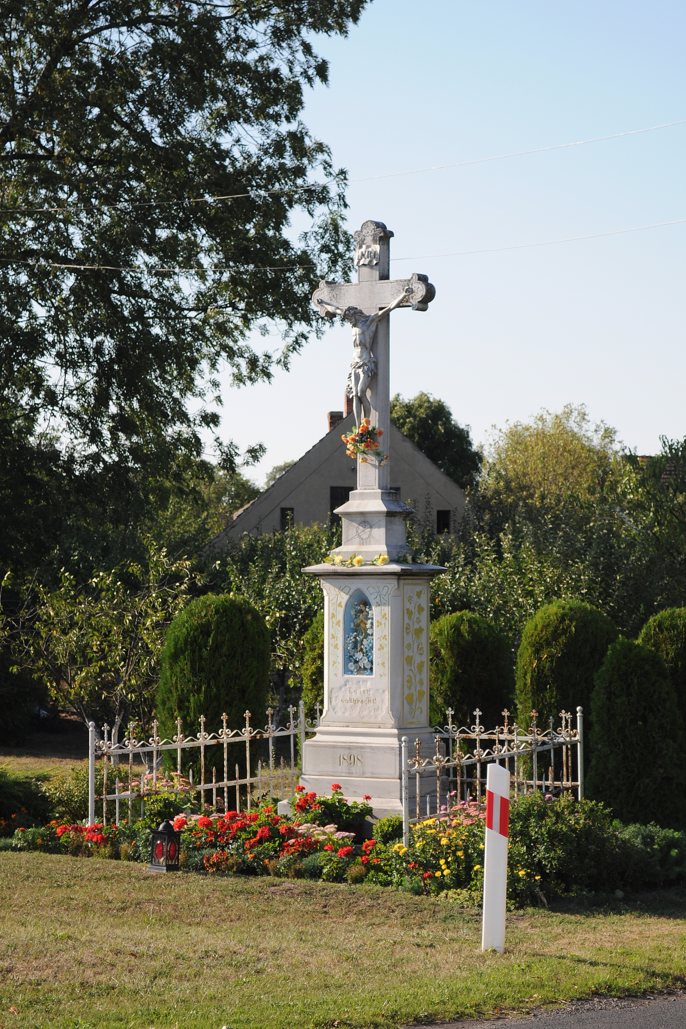 Krzyż przydrożny we wsi Kieleczka.